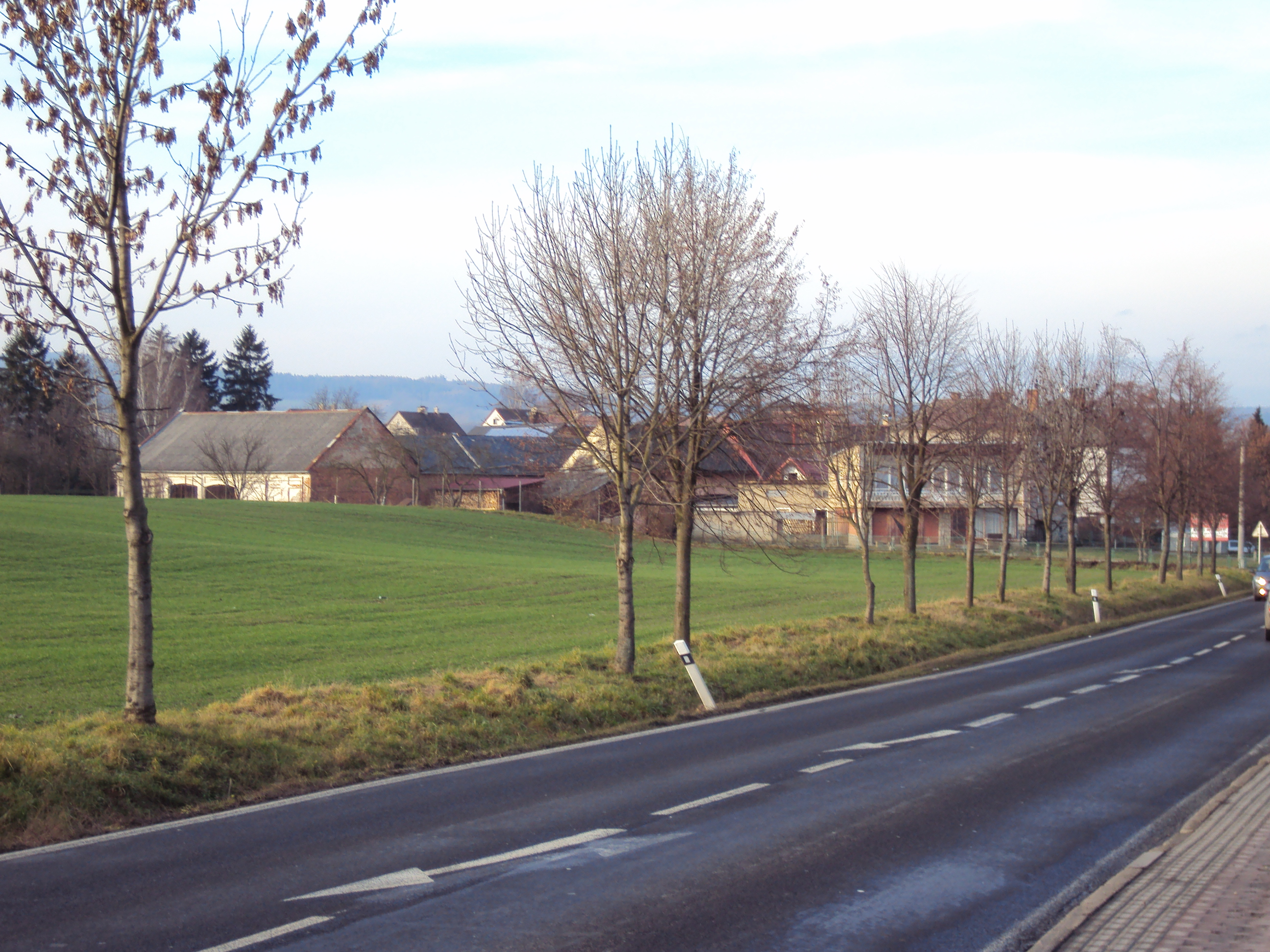 Mohelnice, Libivá, celkový pohled